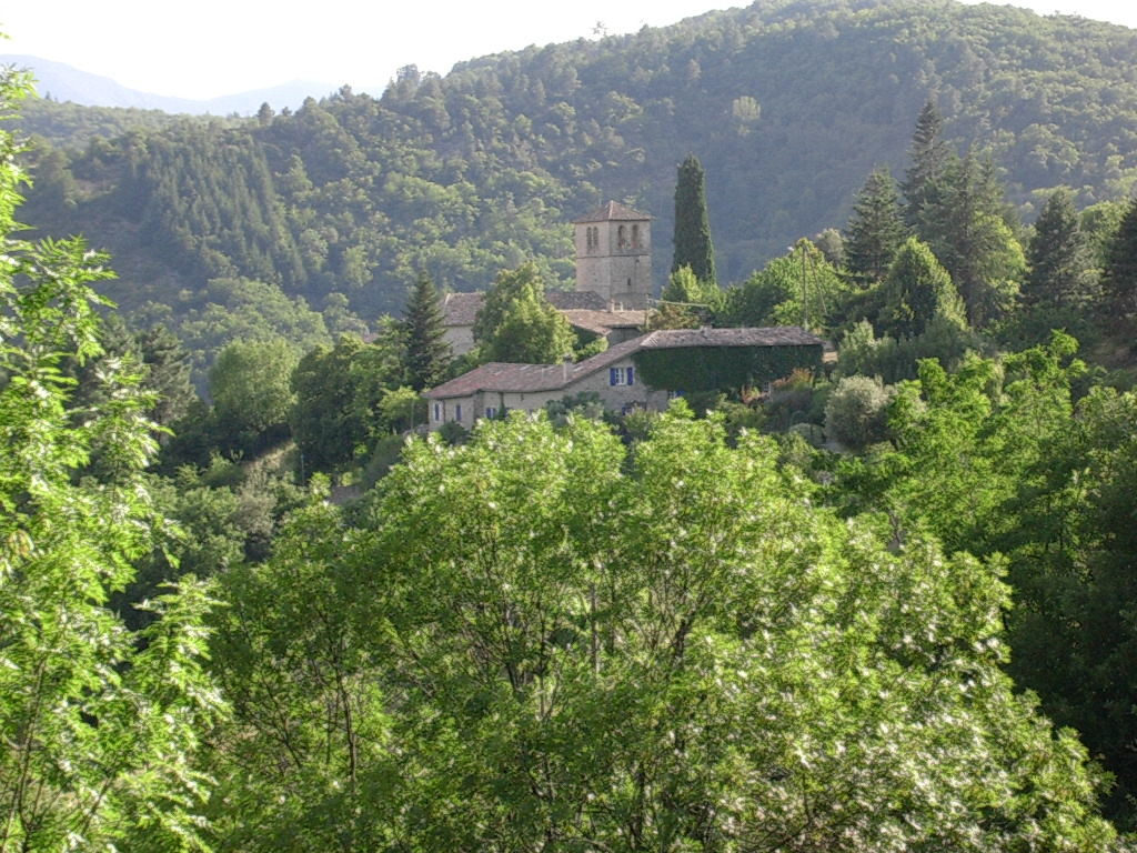 Eglise romane de Niègles, aujourd'hui rattachée à la commune de Pont-de-Labeaume (07 France)